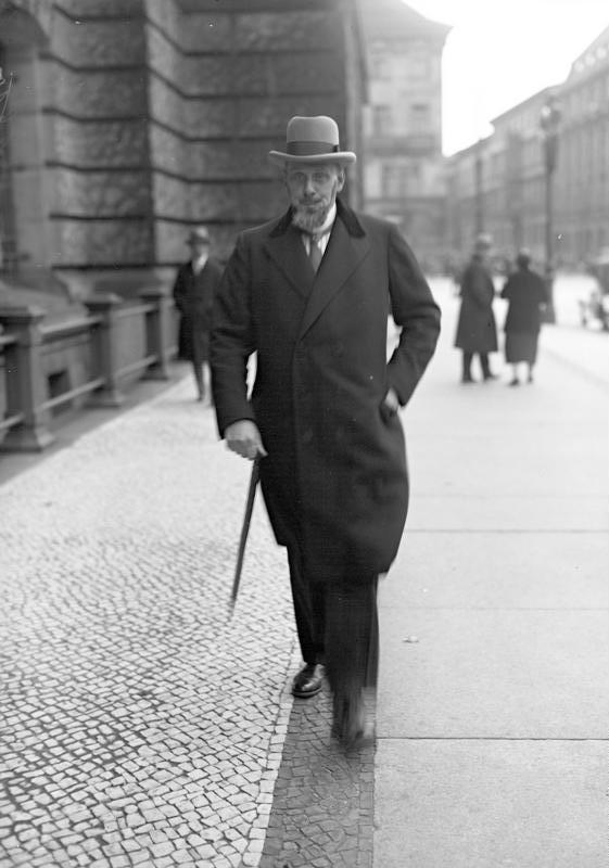 Der deutsche Reichs-Justizminister Dr. Bredt ist von seinem Posten zurückgetreten! Aufnahme des Reichs-Justizministers Dr. Bredt.